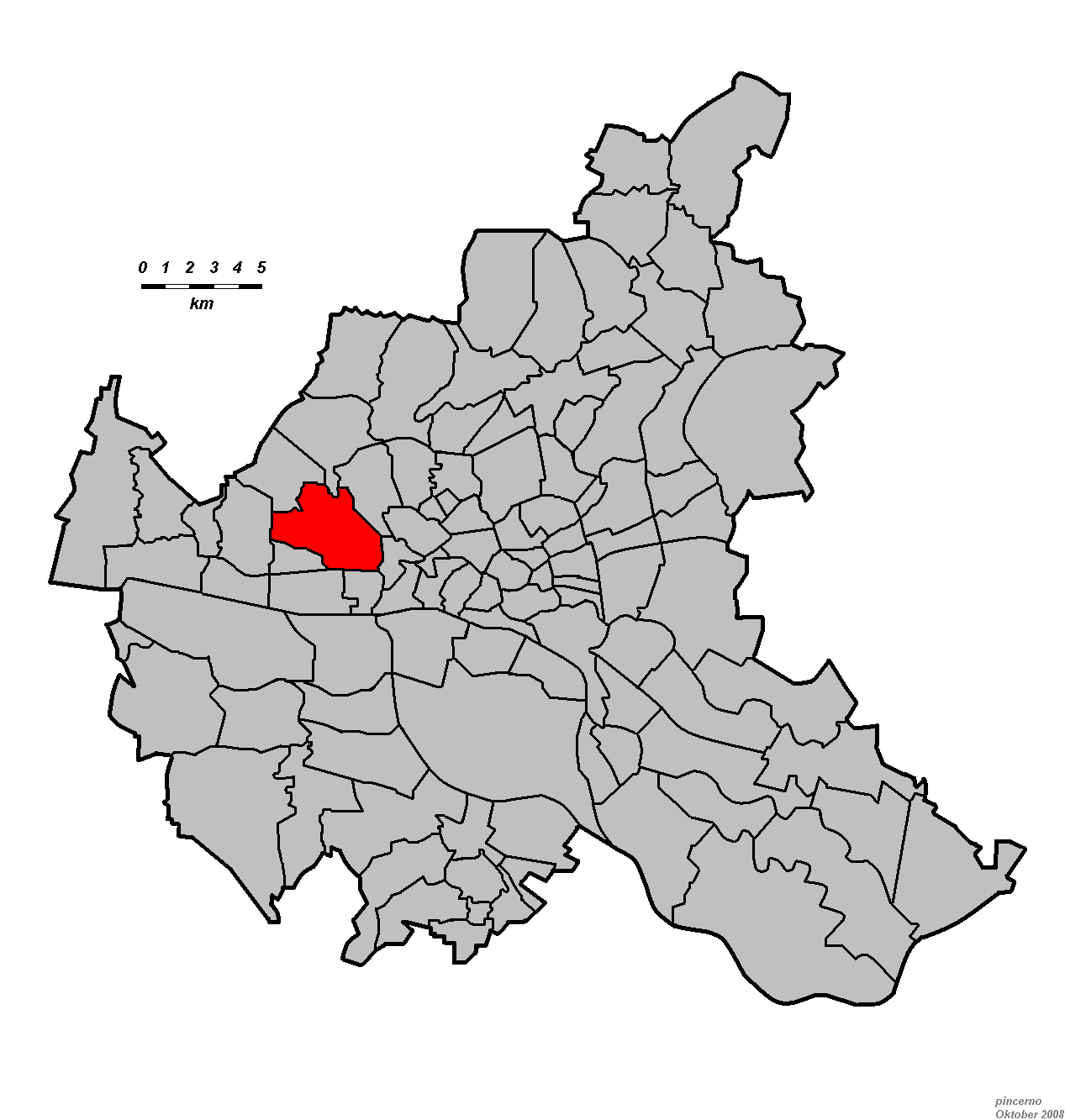 Hamburg: Stadtteil Hamburg-Bahrenfeld